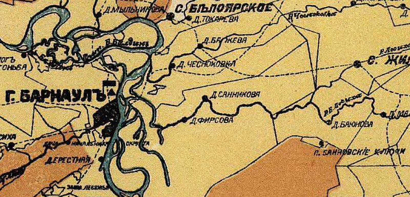 Деревня Санникова и ближайшие населённые пункты. Фрагмент карты Томской губернии (1911 г.)